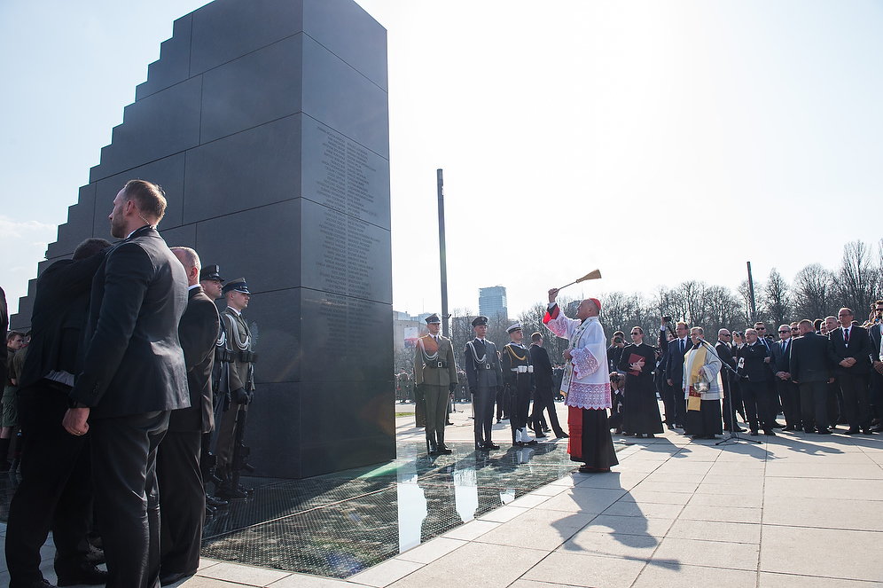 Poświęcenie Pomnika Ofiar Tragedii Smoleńskiej 2010 przez kard. Kazimierza Nycza. 2018.04.10 Warszawa | Premier Mateusz Morawiecki wziął udział w odsłonięcia Pomnika Ofiar Tragedii Smoleńskiej 2010 na placu Piłsudskiego oraz Marszu Pamięci. Fot. W. Kompała / KPRM